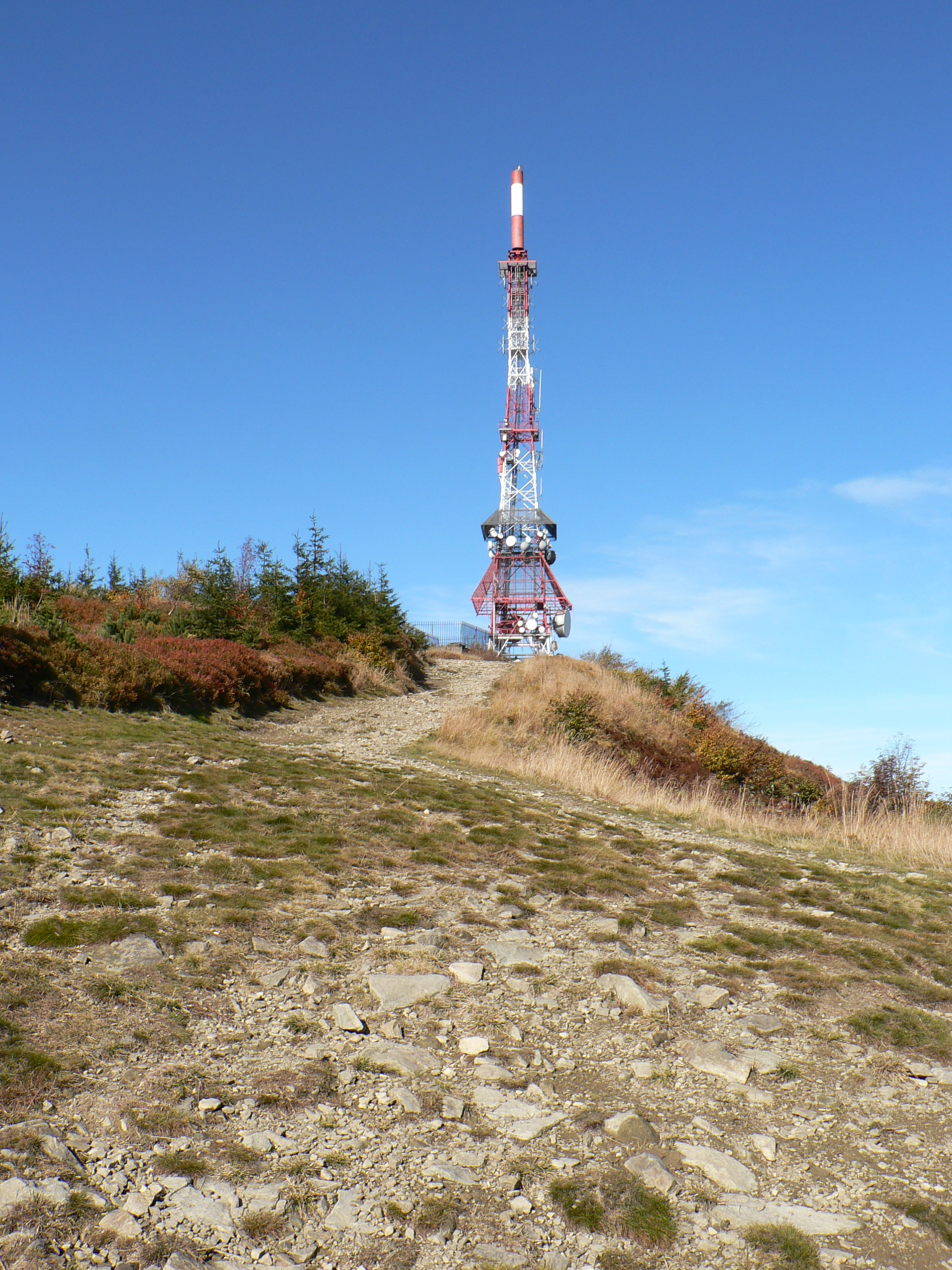 Wieża na Skrzycznem